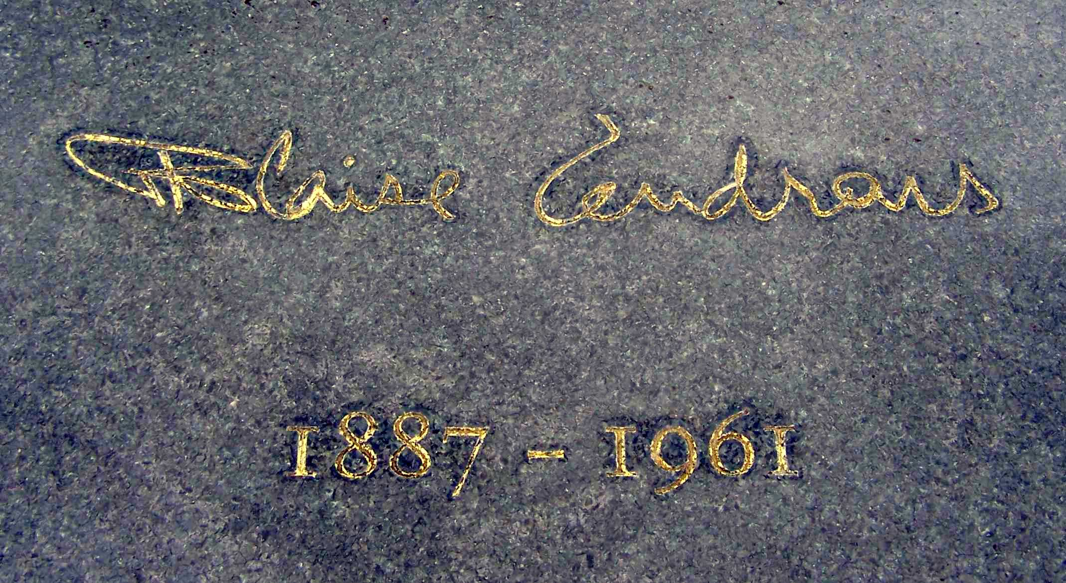 Gravure de la tombe de Blaise Cendrars au Tremblay-sur-Mauldre (Yvelines, France)